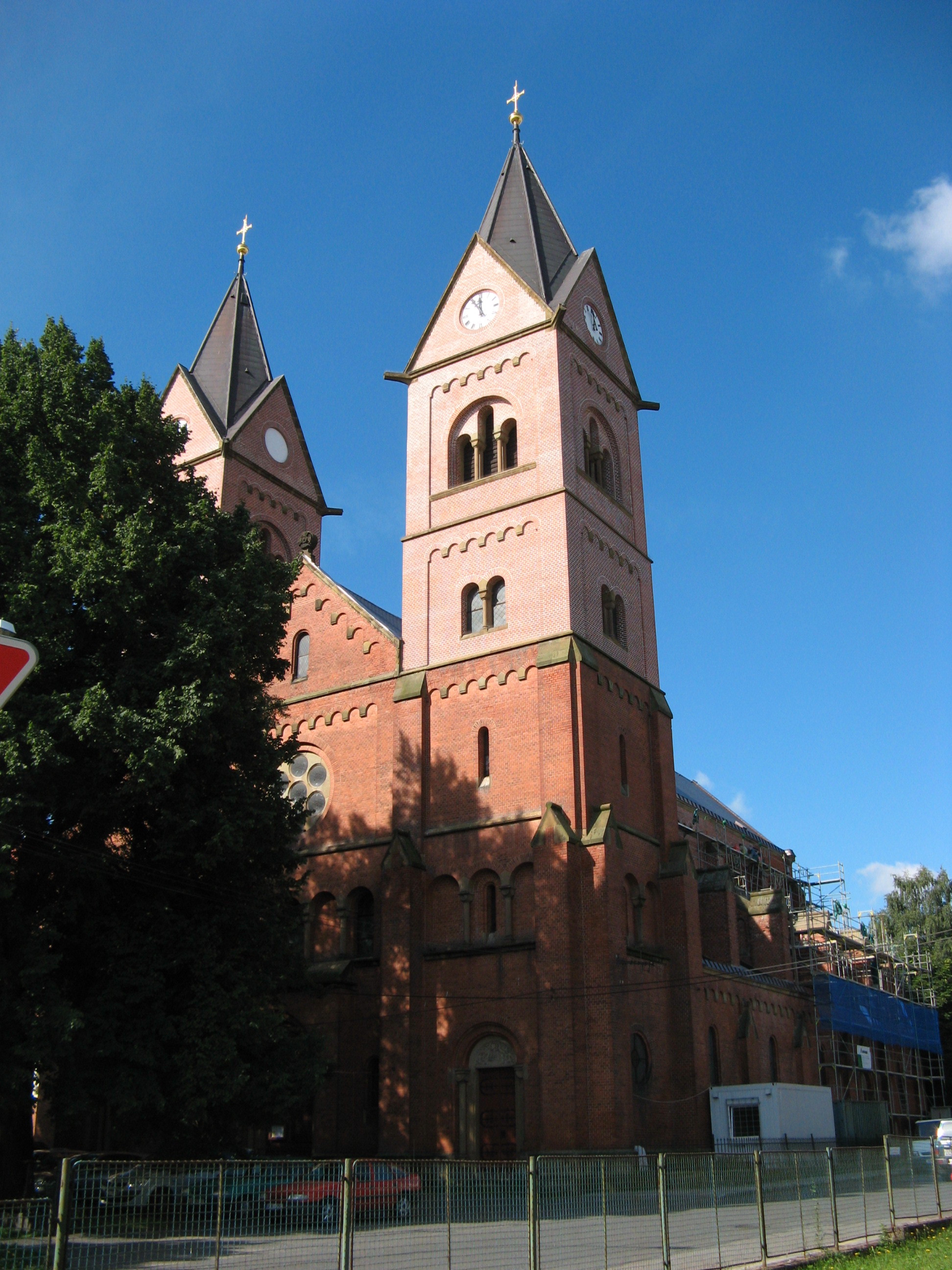 Kostel svatého Josefa (Svitavy), Czech Republic